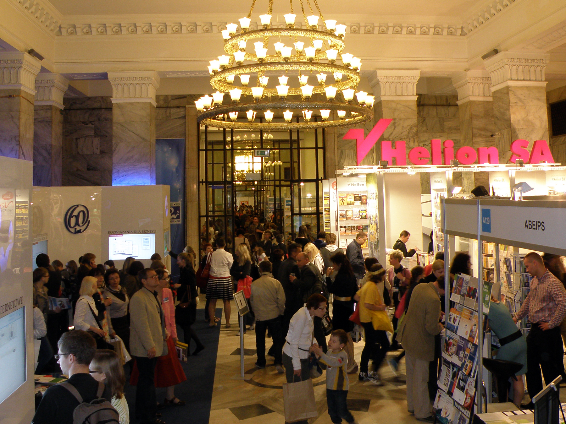 Warszawskie Targi Książki, PKiN